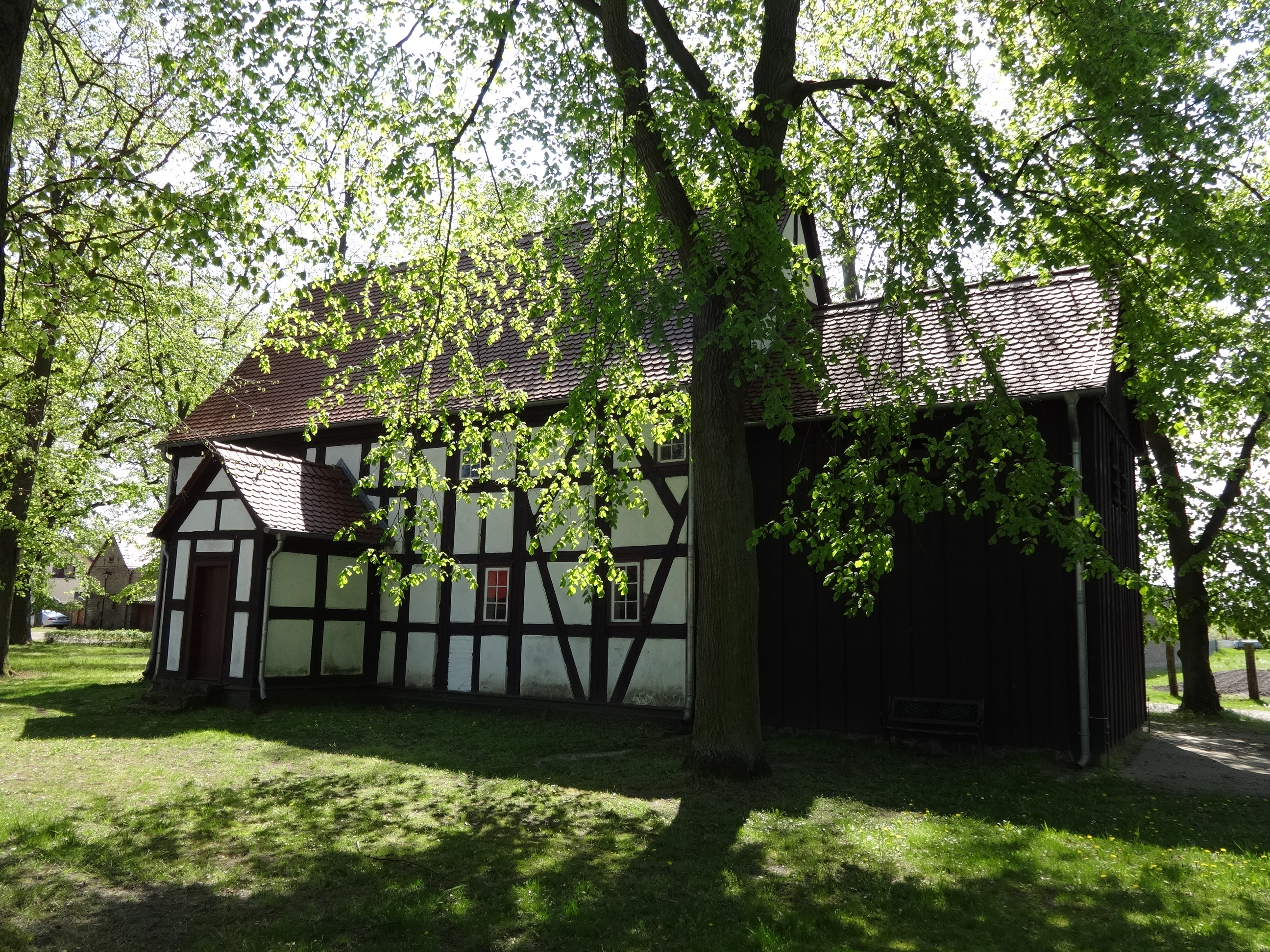 Die Dorfkirche Groß Schauen entstand in der ersten Hälfte des 18. Jahrhunderts in Fachwerkbauweise. 1822 fügte die Kirchengemeinde ein Glockenhaus an und ließ eine Empore sowie einen Kanzelaltar einbauen.